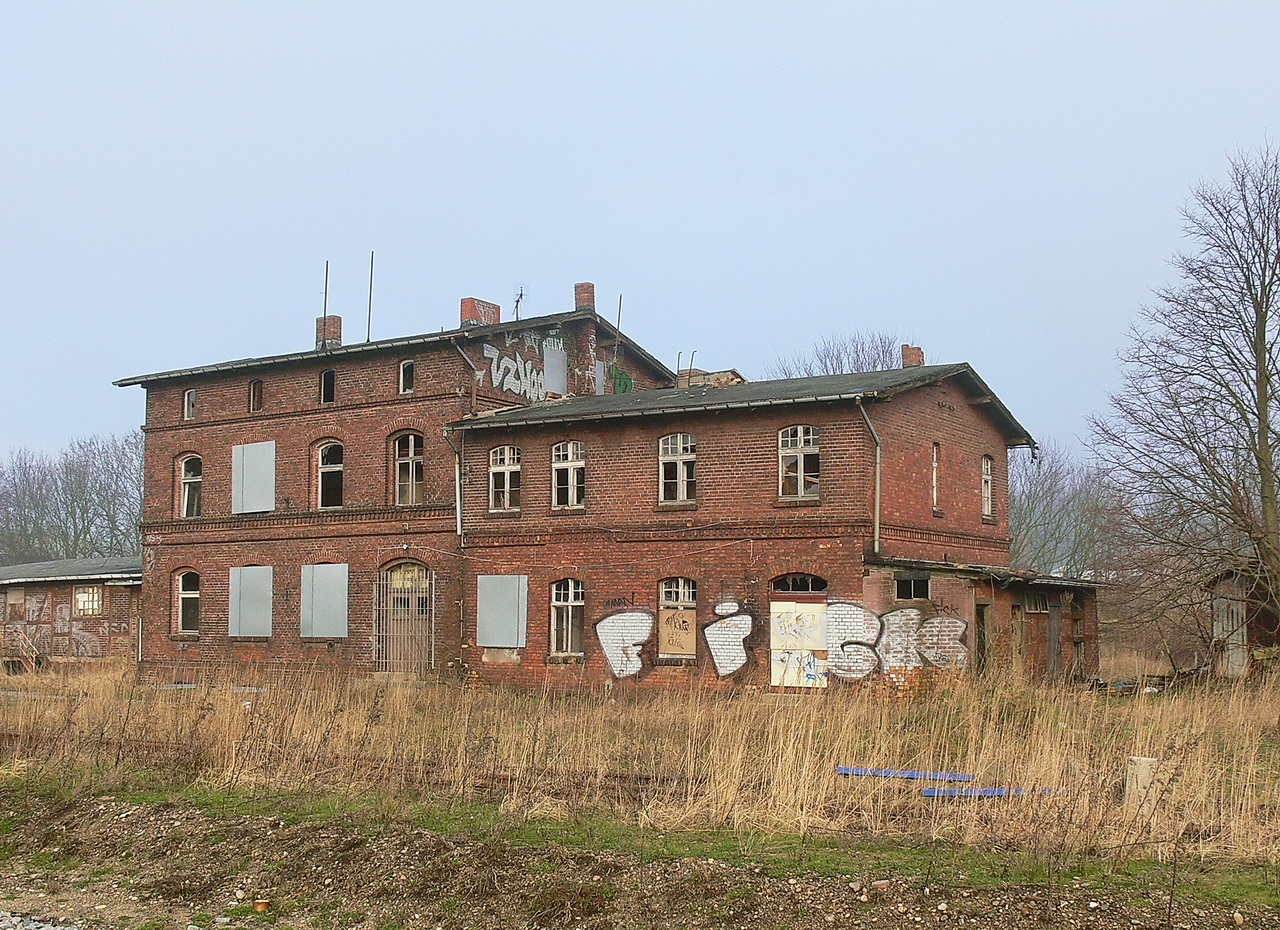 Empfangsgebäude der Kleinbahn in Bahnhof Barth